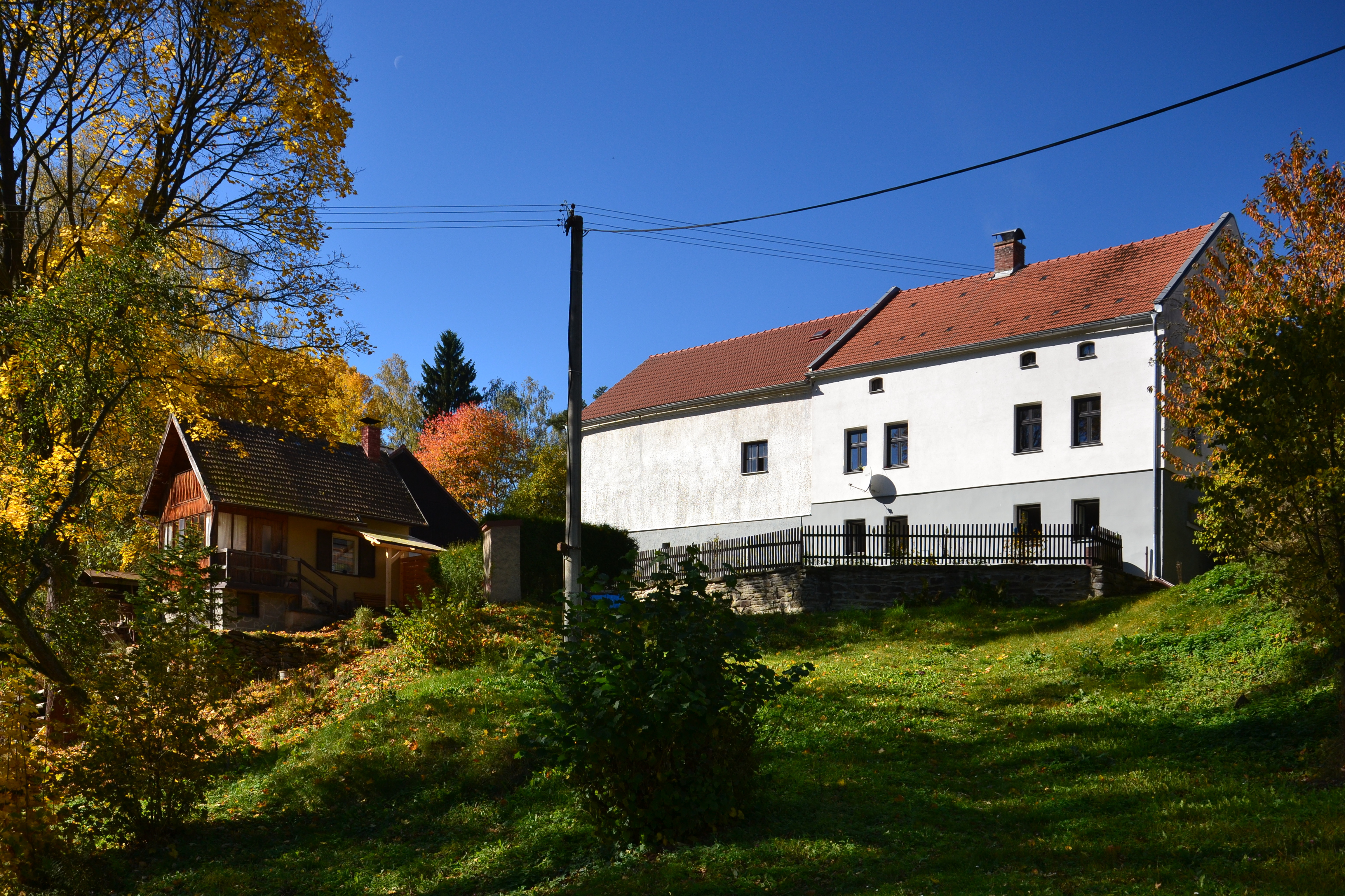 Přestání – náves